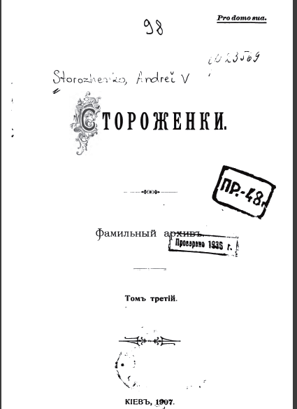 Титульная страница третьего тома идания: Стороженки. Фамильный архив. Т. 1-4, 6-8. / Сост. Стороженко А. В., Модзалевский В. Л. — Киев: Типография товарищества Г. Л. Фронцкевича, 1903—1907. — 200 экз.